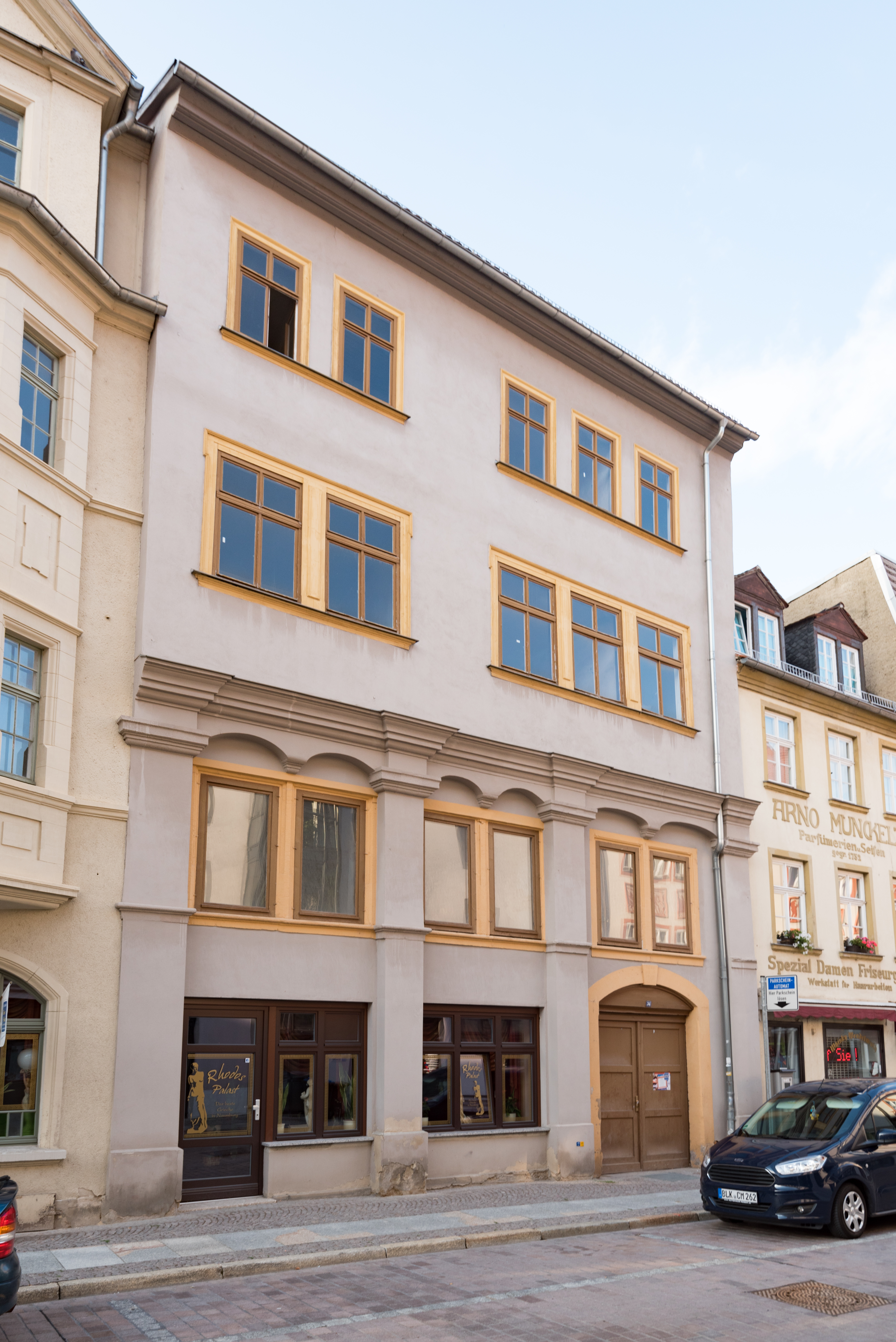 Naumburg (Saale), Marienstraße 34